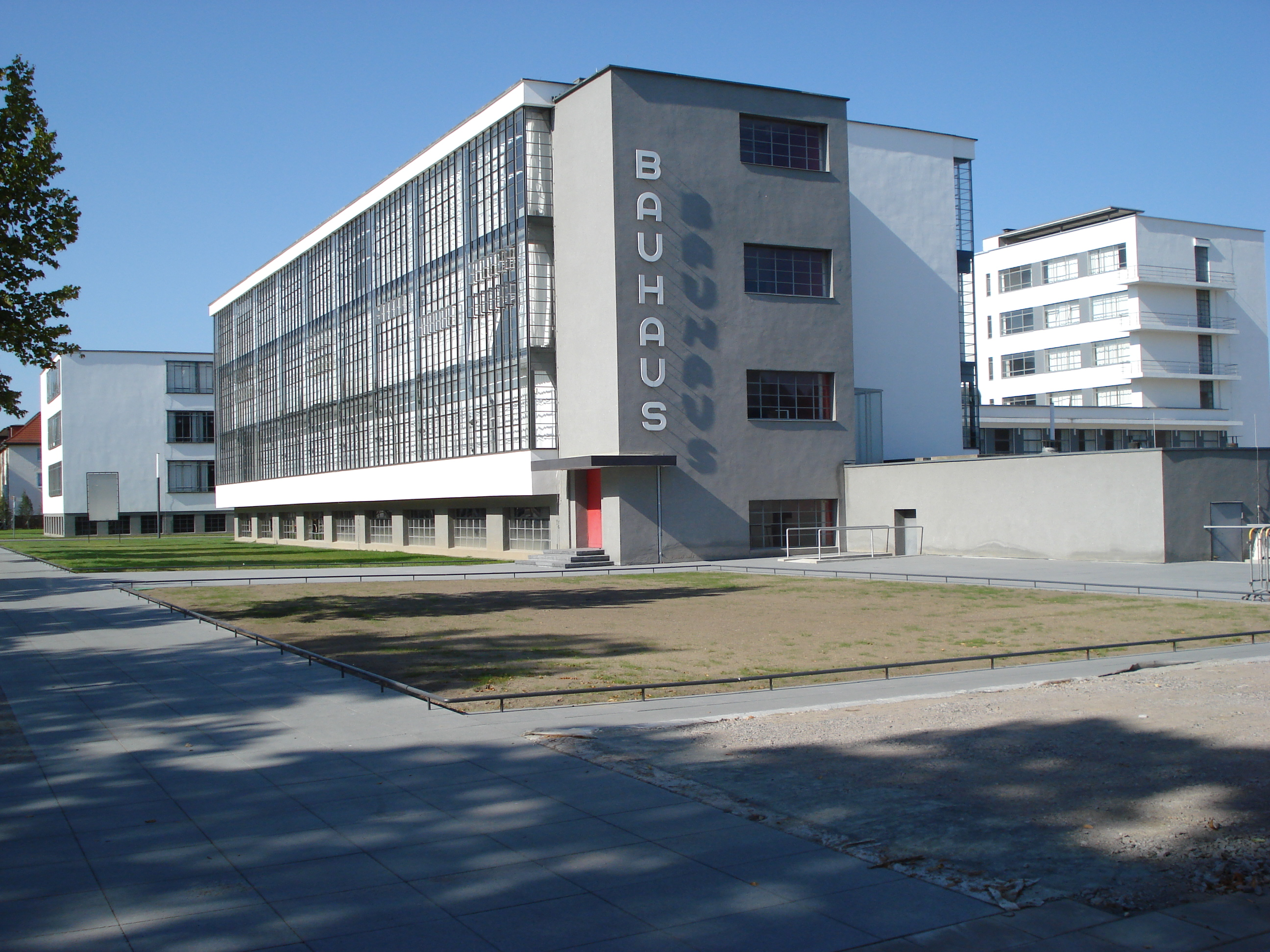 Bauhaus Dessau aktuell